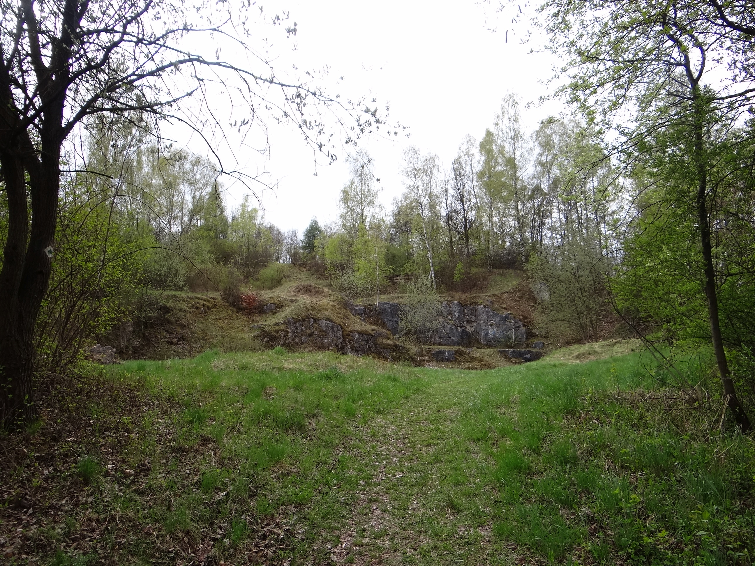 Wzgórze Wielkanoc w Tyńcu w Krakowie